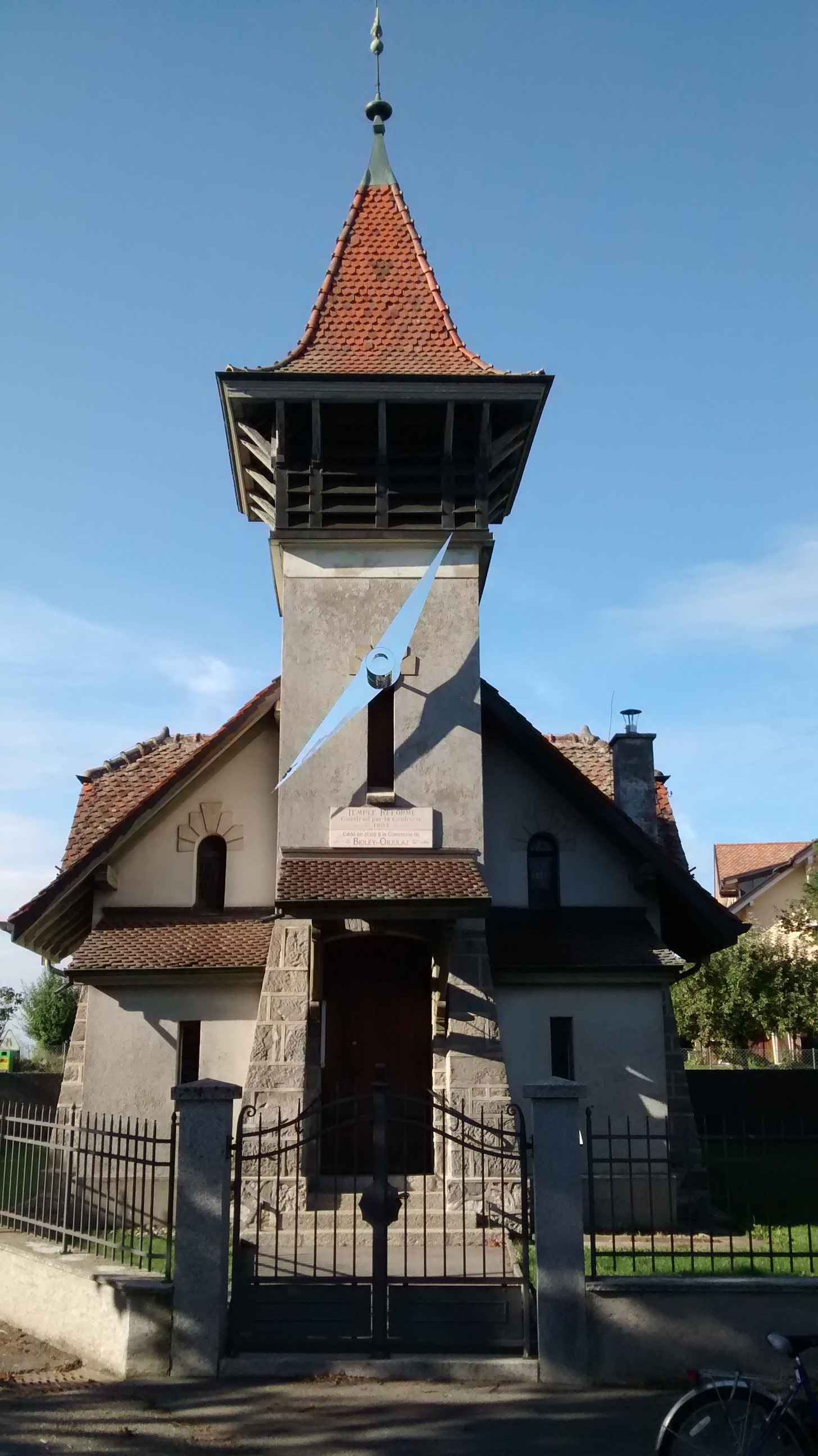 La Chapelle de Bioley-Orjulaz